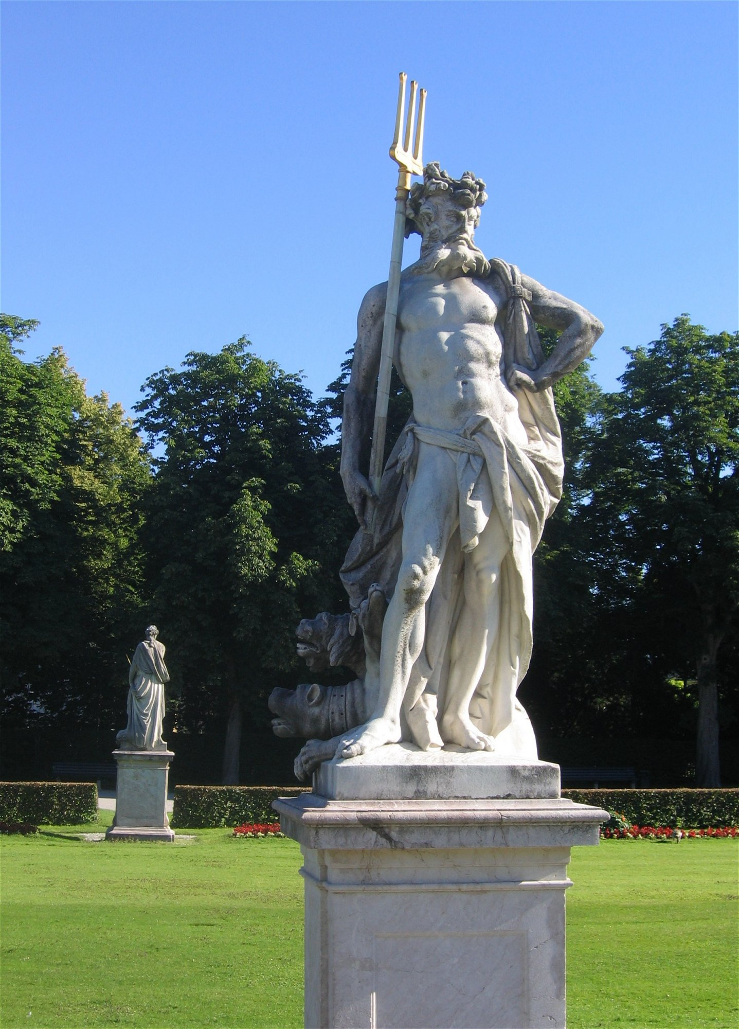 Schlosspark Nymphenburg, Statue im Gartenparterre, Pluto von Dominik Auliczek